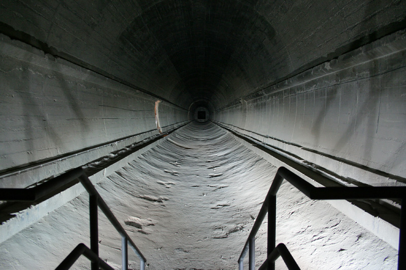 Die leere Röhre des Regierungsbunkers im Ahrtal